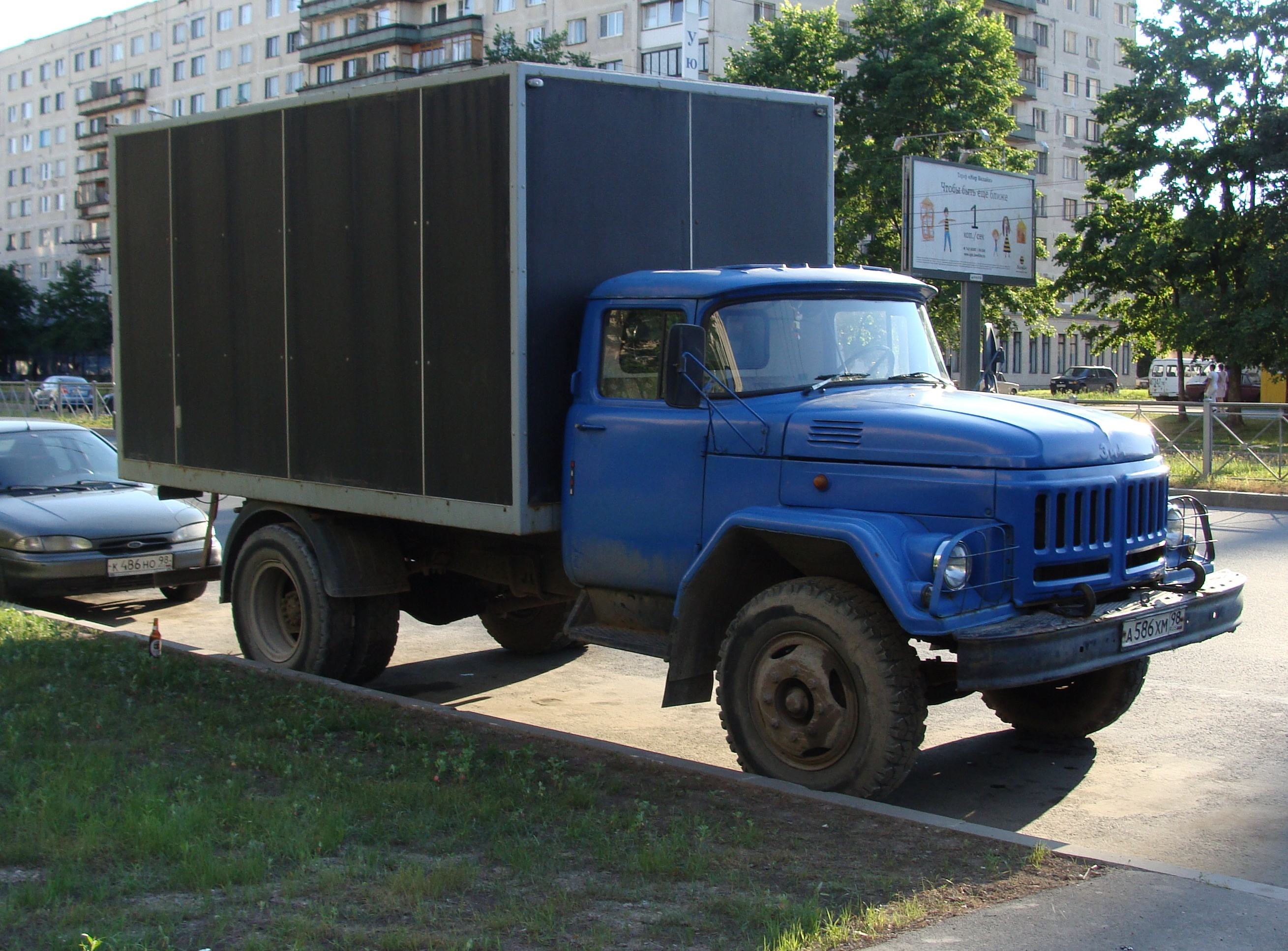 ЗИЛ-431920 производства Уральского автомоторного завода